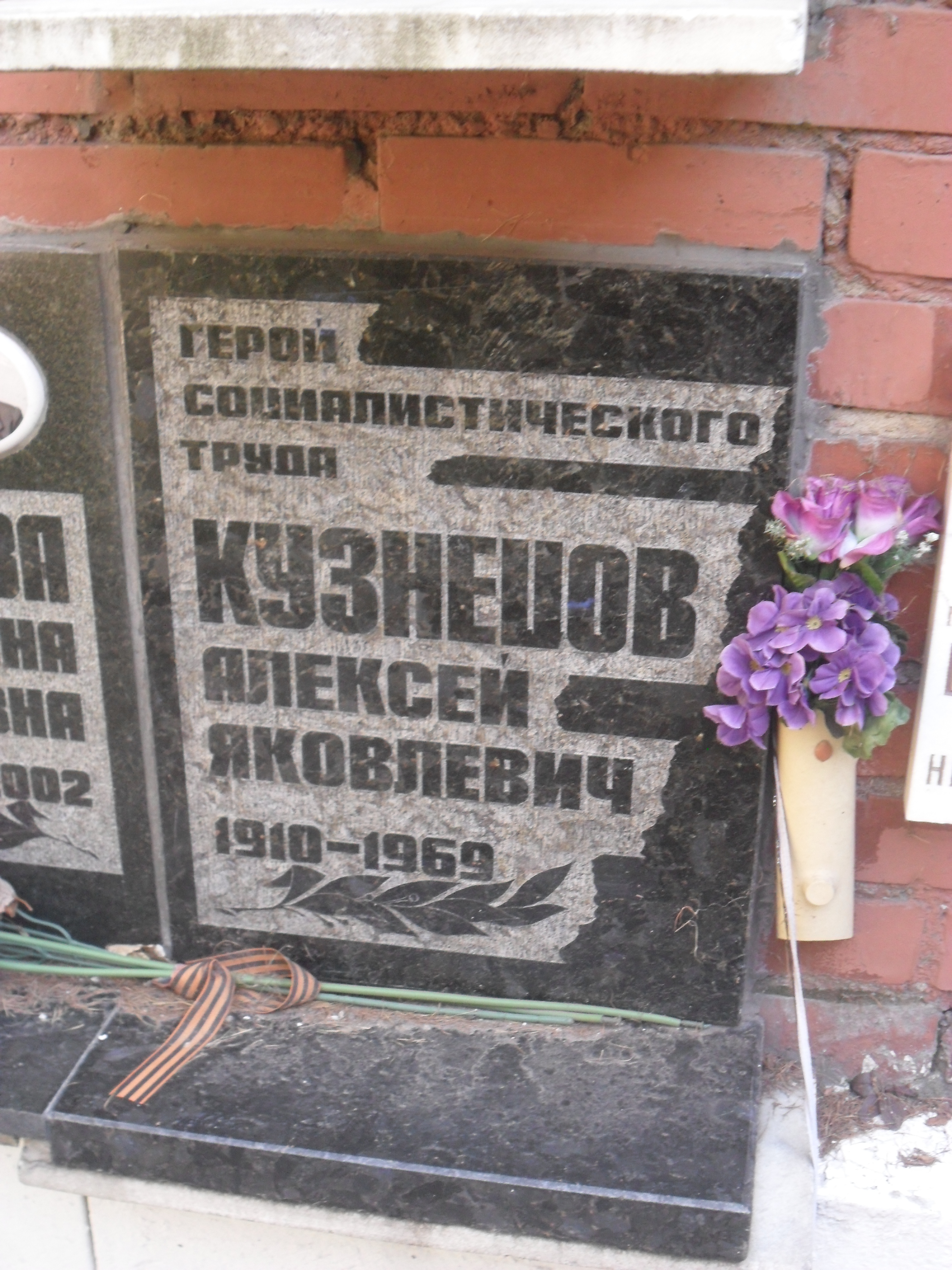 Плита колумбария Героя Социалистического Труда Александра Кузнецова на Новодевичьем кладбище Москвы.